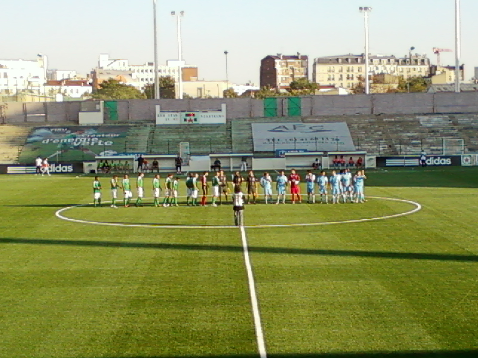 Présentation des équipes lors du match Red Star - Bayonne du 01er octobre 2011 au Stade Bauer